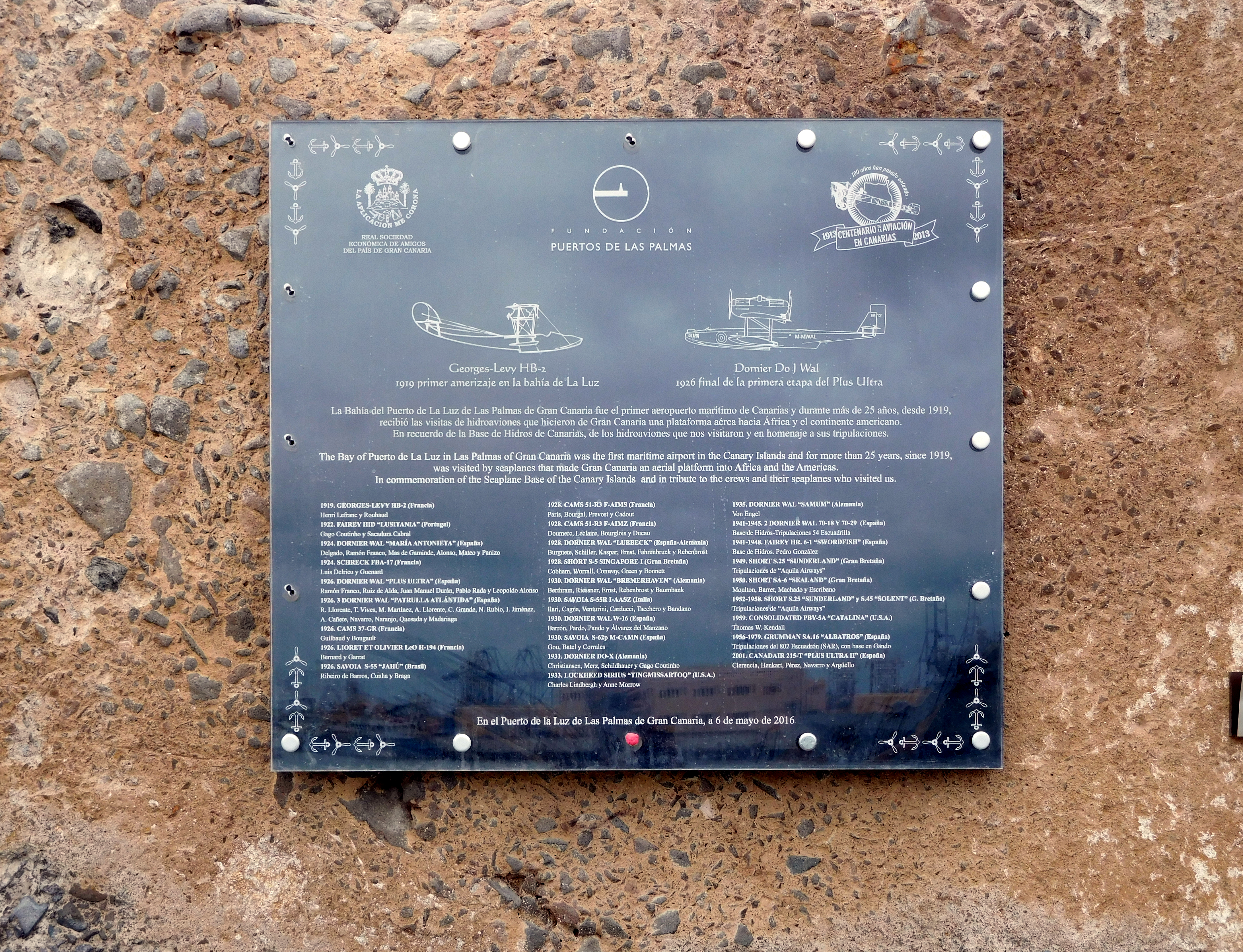 Gedenkstein Besuch DO X in Las Palmas